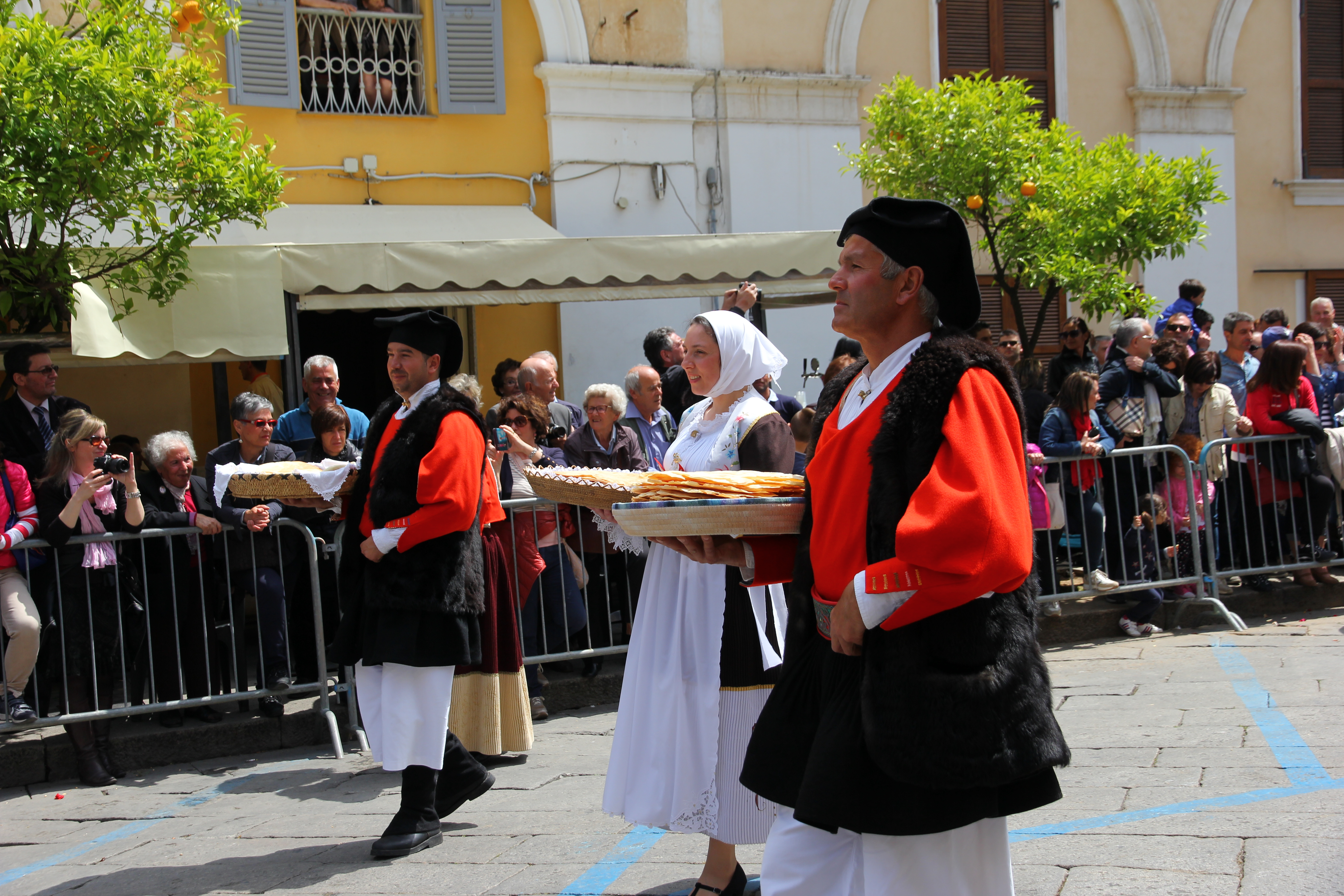 Costume tradizionale